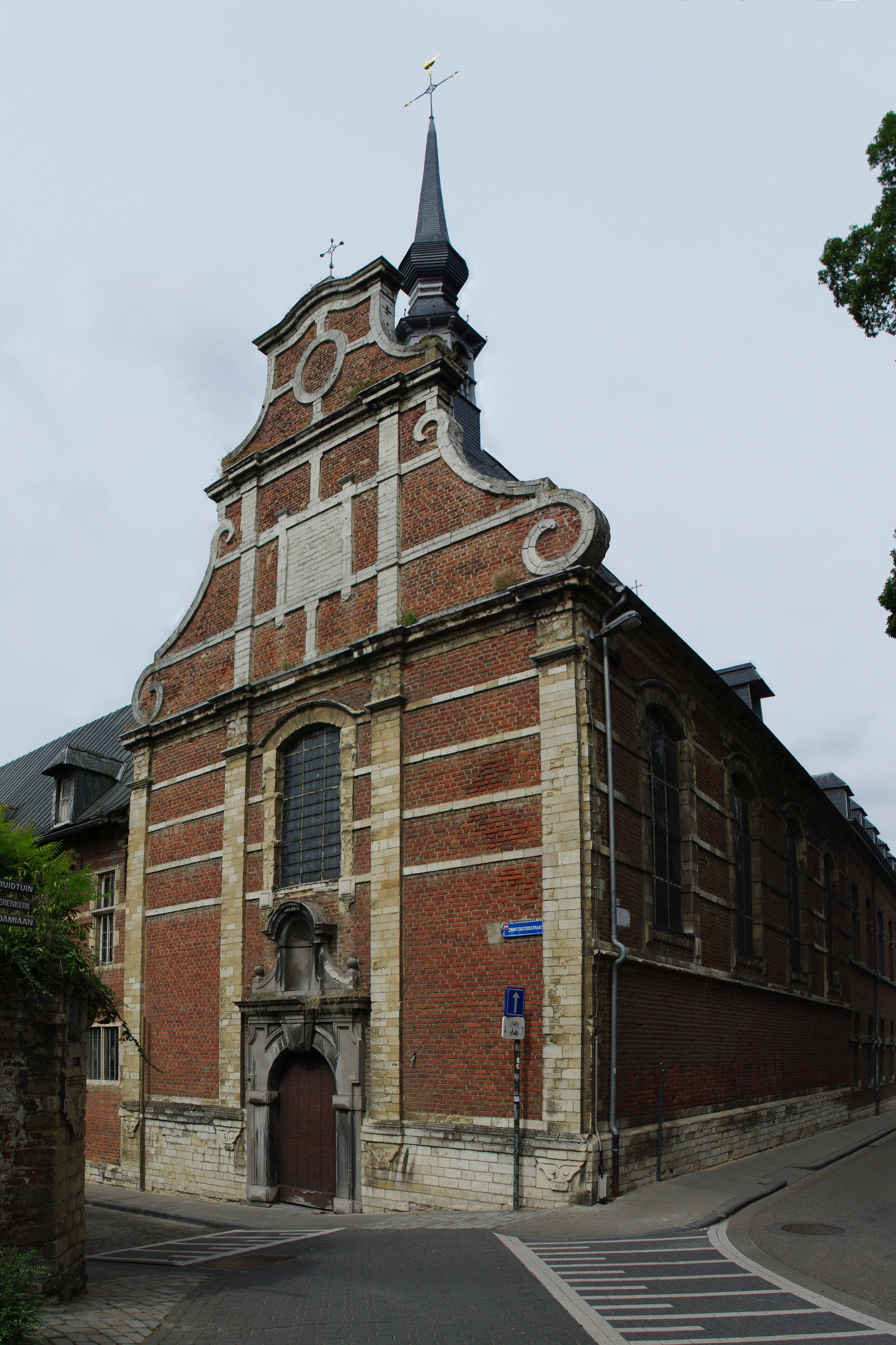 Zwartezusterkapel (Leuven)